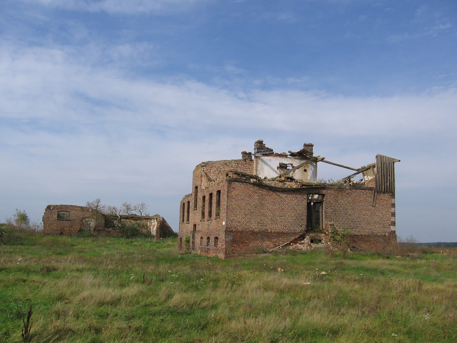 Luckow, Germany